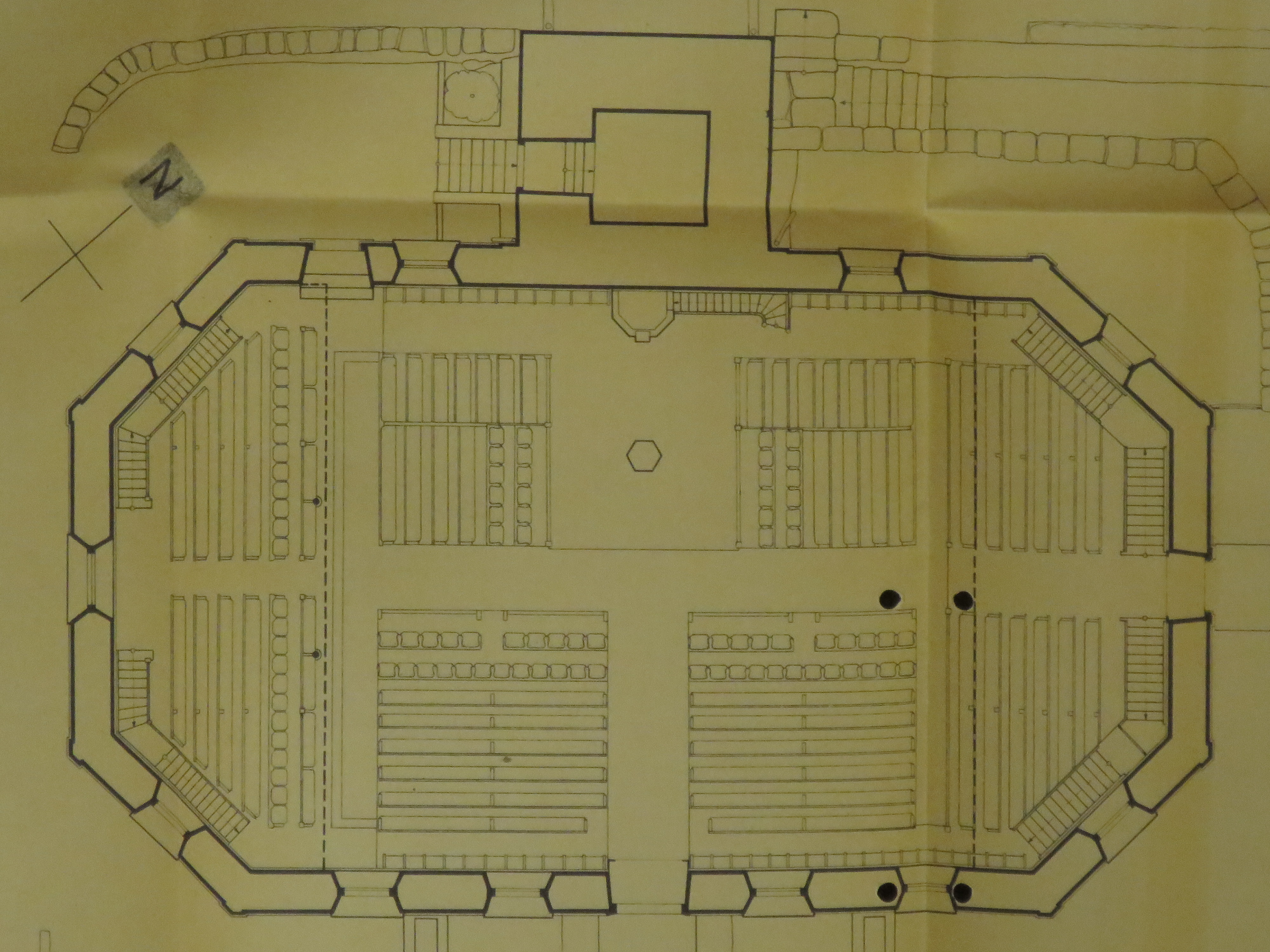 Grundriss der reformierten Kirche Netstal, Bauzeit: 1811-1813. Der Grundriss dokumentiert den Bauzustandtand im 20.Jhdt.